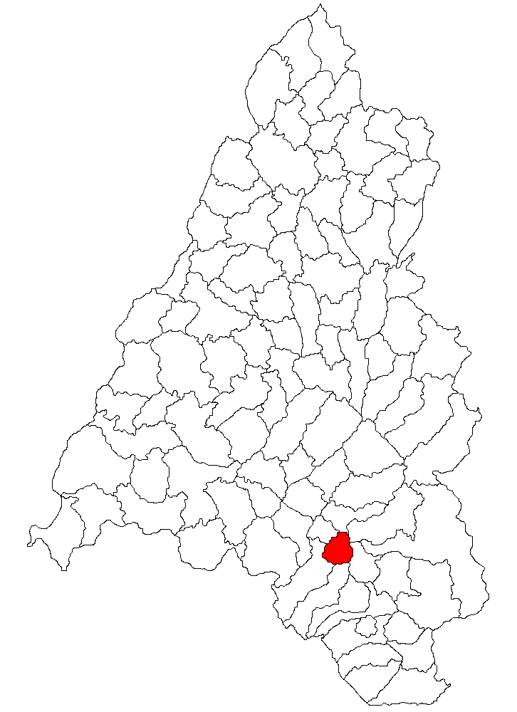 Categorie:Hărţi ale judeţului Bihor